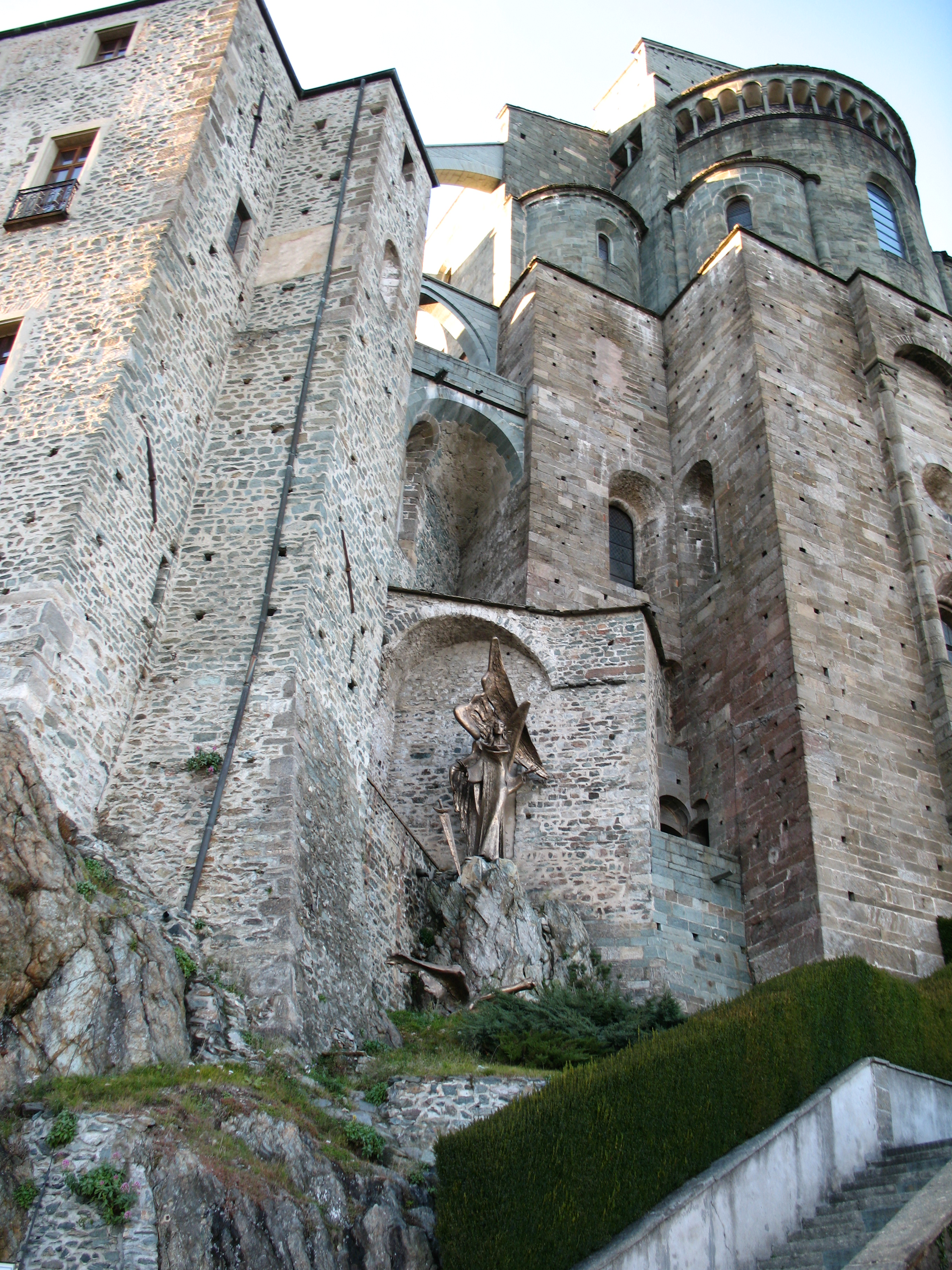 Sacra di San Michele, statua di San Michele - Valle di Susa